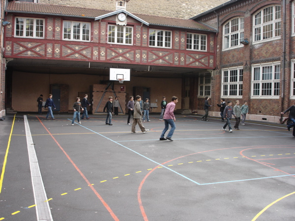 Bâtiment Auburtin Auteur : AlntheiA, AE 2004